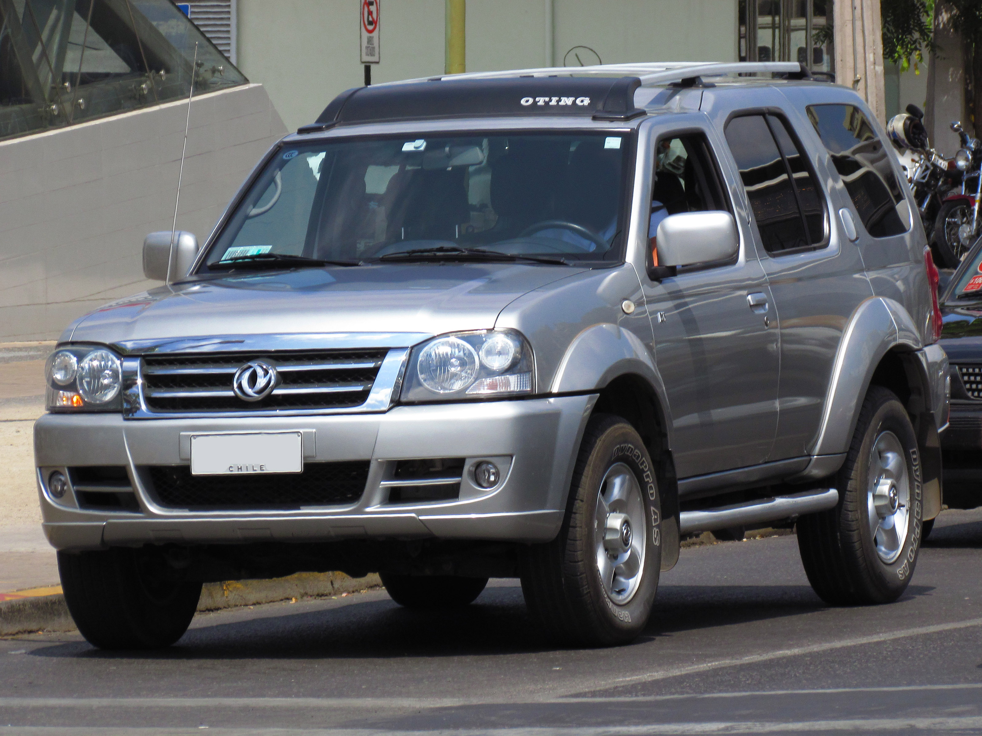 Dongfeng ZNA Oting 2.4 2009